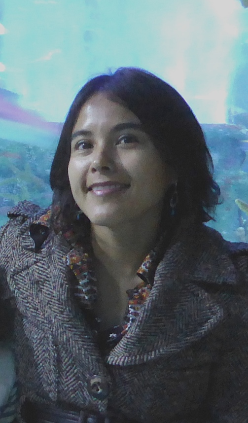 Fotografía de Joseline Tapia Z., científica chilena, pionera en el área de Geología Ambiental en Chile (2016).